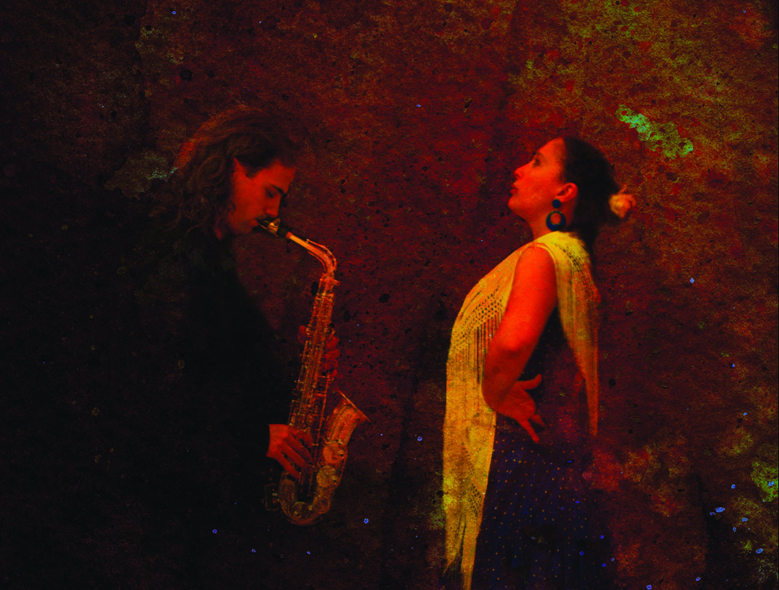 Al Carmona Fringe 2007 Alberto Porro Carmona